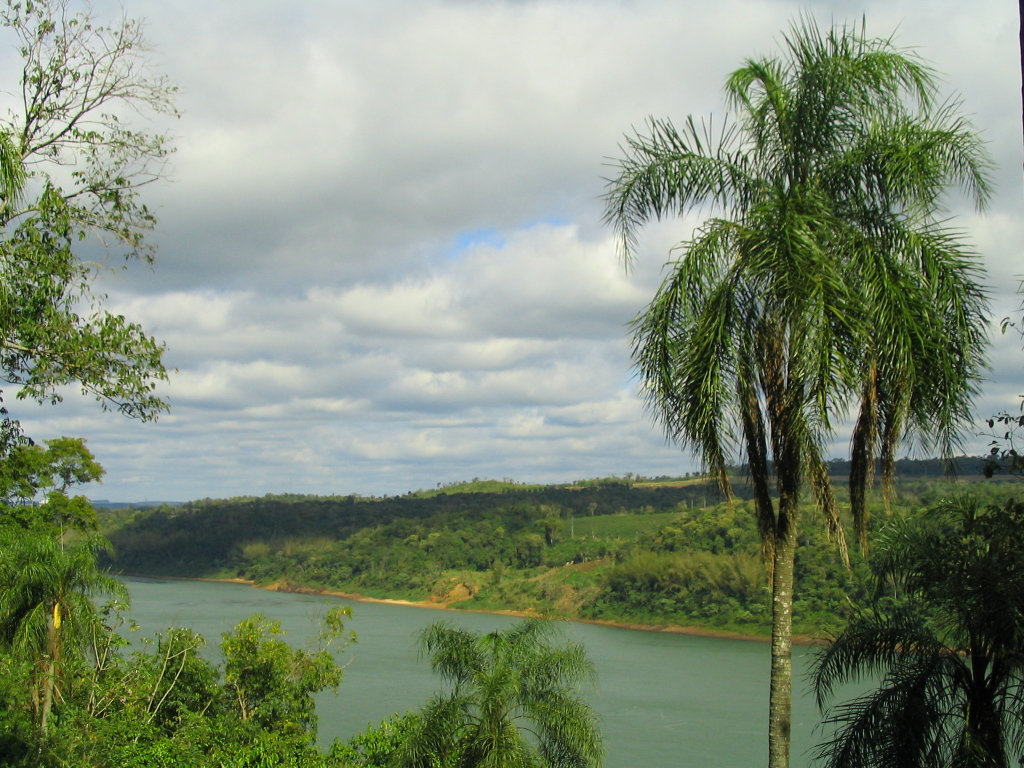 ElDorado